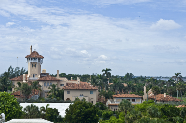 maralago1